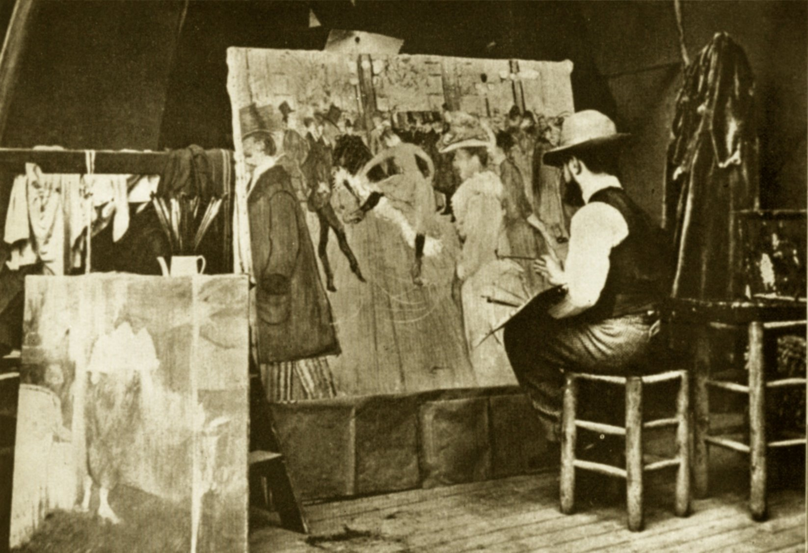 Lautrec maluje obraz V Moulin Rouge